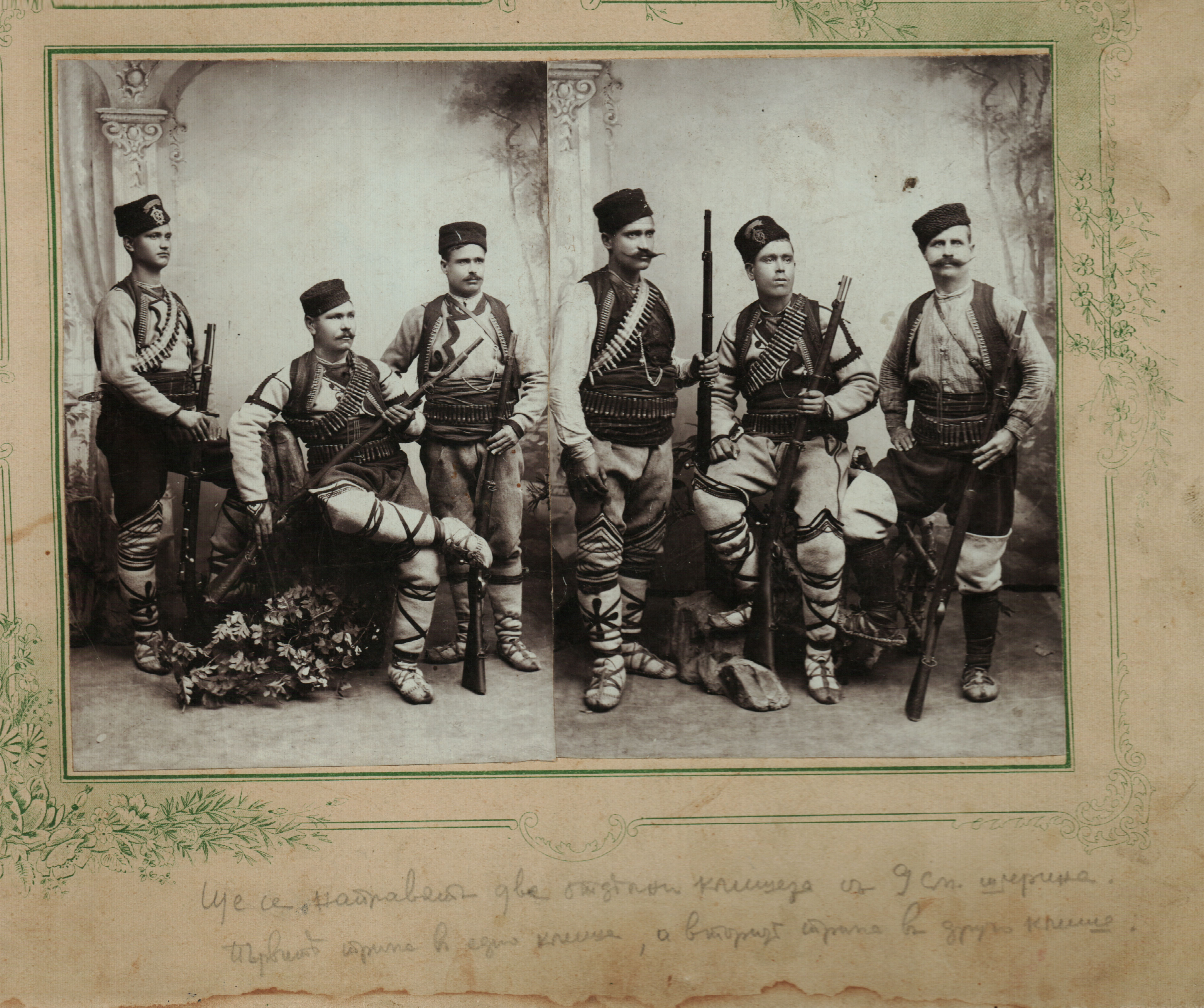 Снимка на Трайко К. Аджаларски, Мино Токлев, Доне Постоларски, и Яне Лисичин Казановлия, Лазар Голов, Христо Дили-пале.